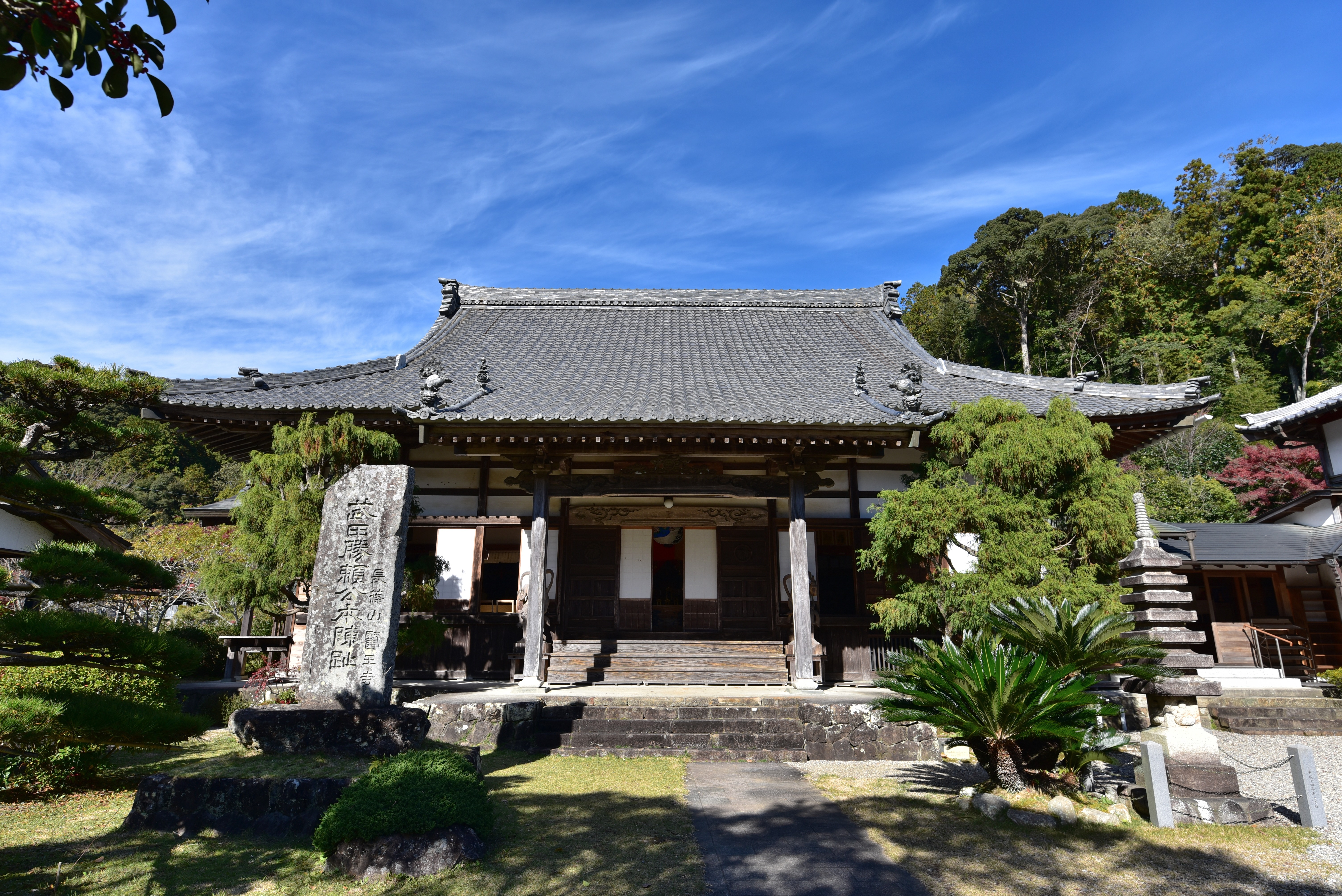 医王寺本堂 Nikon D750